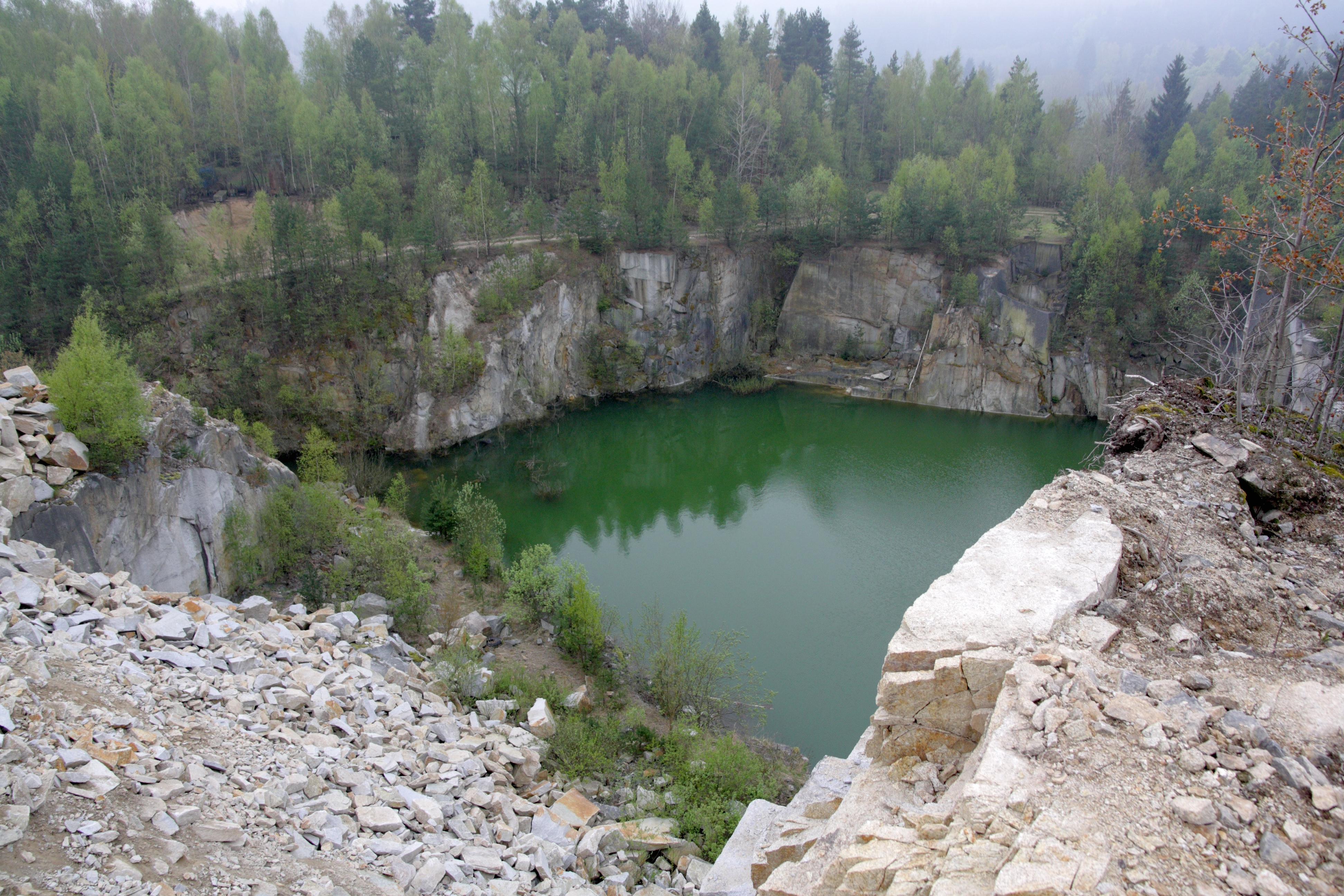 Mrákotín (okr. Jihlava) - žulové lomy v okolí Mrákotína.